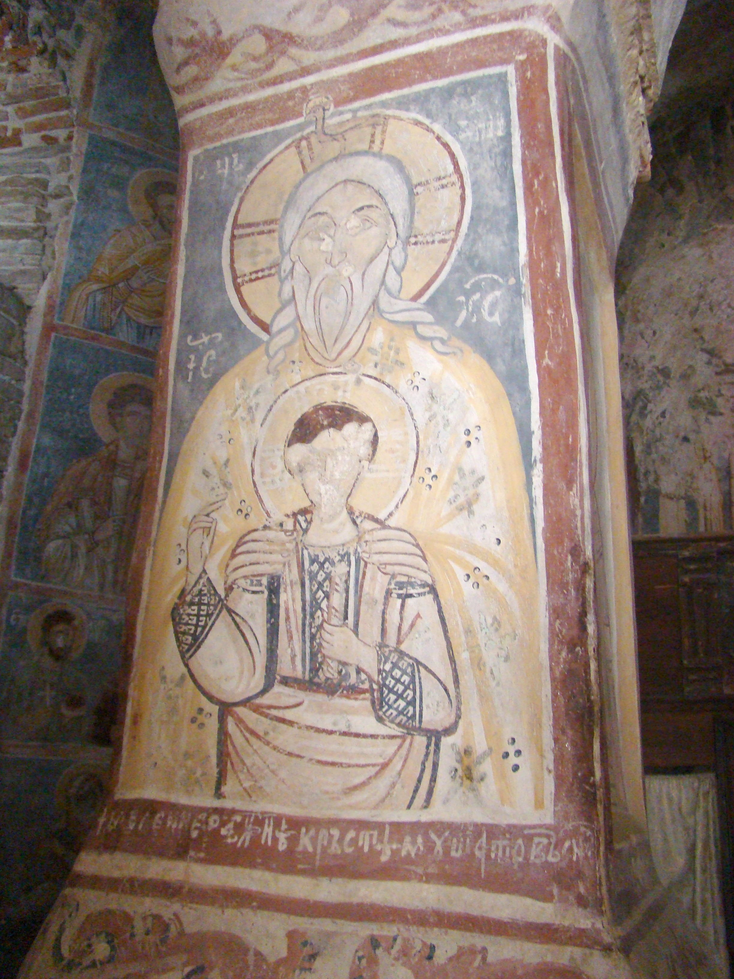 Biserica „Sf.Nicolae”, Densuș, Hunedoara